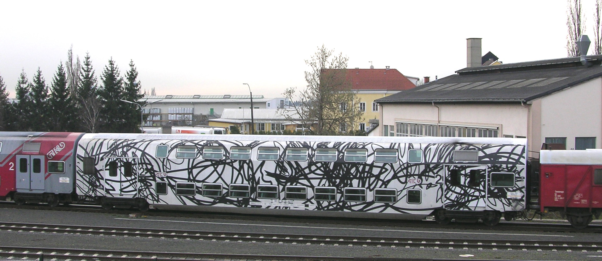 GKB Doppelstockwagon gestaltet von Otto Zitko